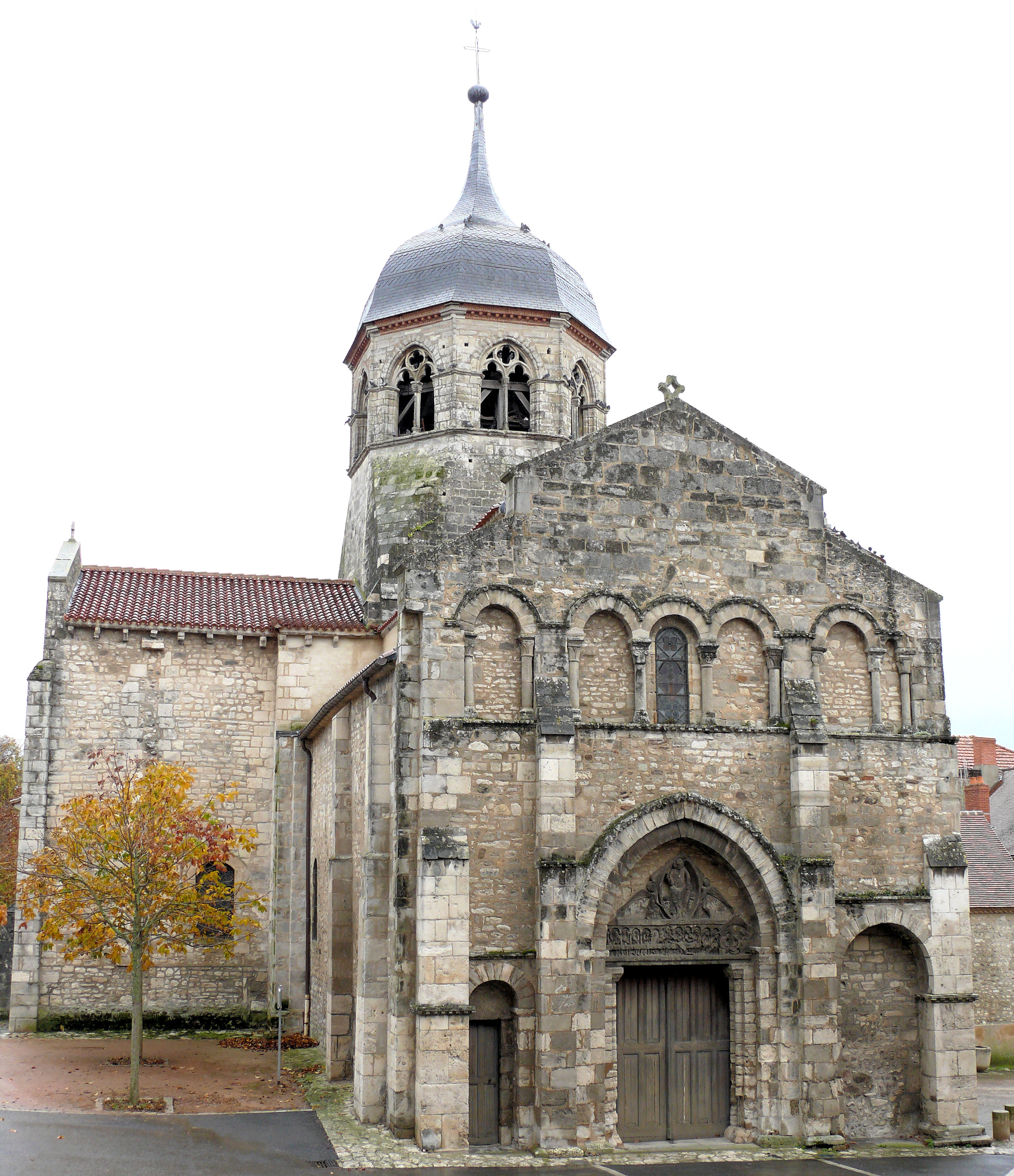 Bellenaves - Église Saint-Martin - Ensemble